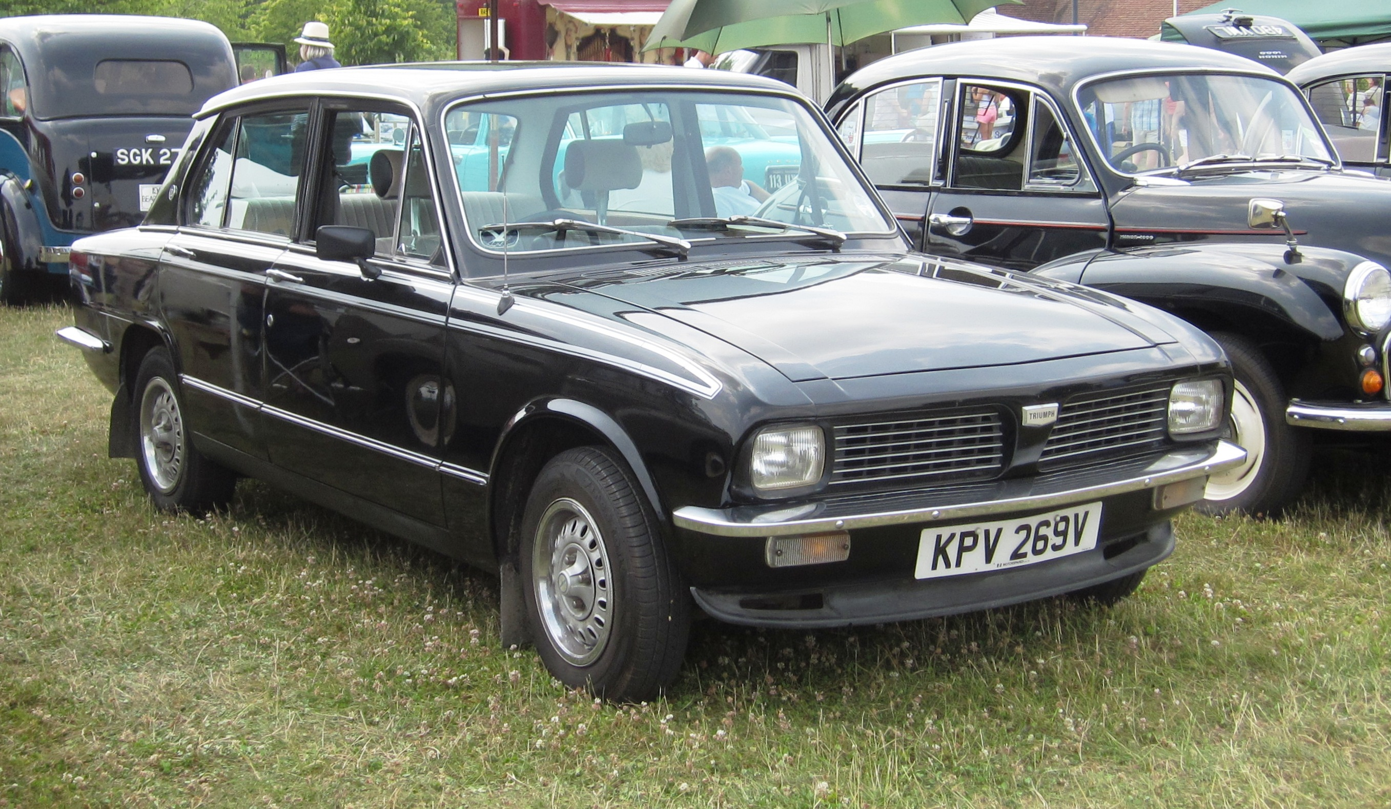 Triumph Dolimite 1500 a 4 portes (1980)